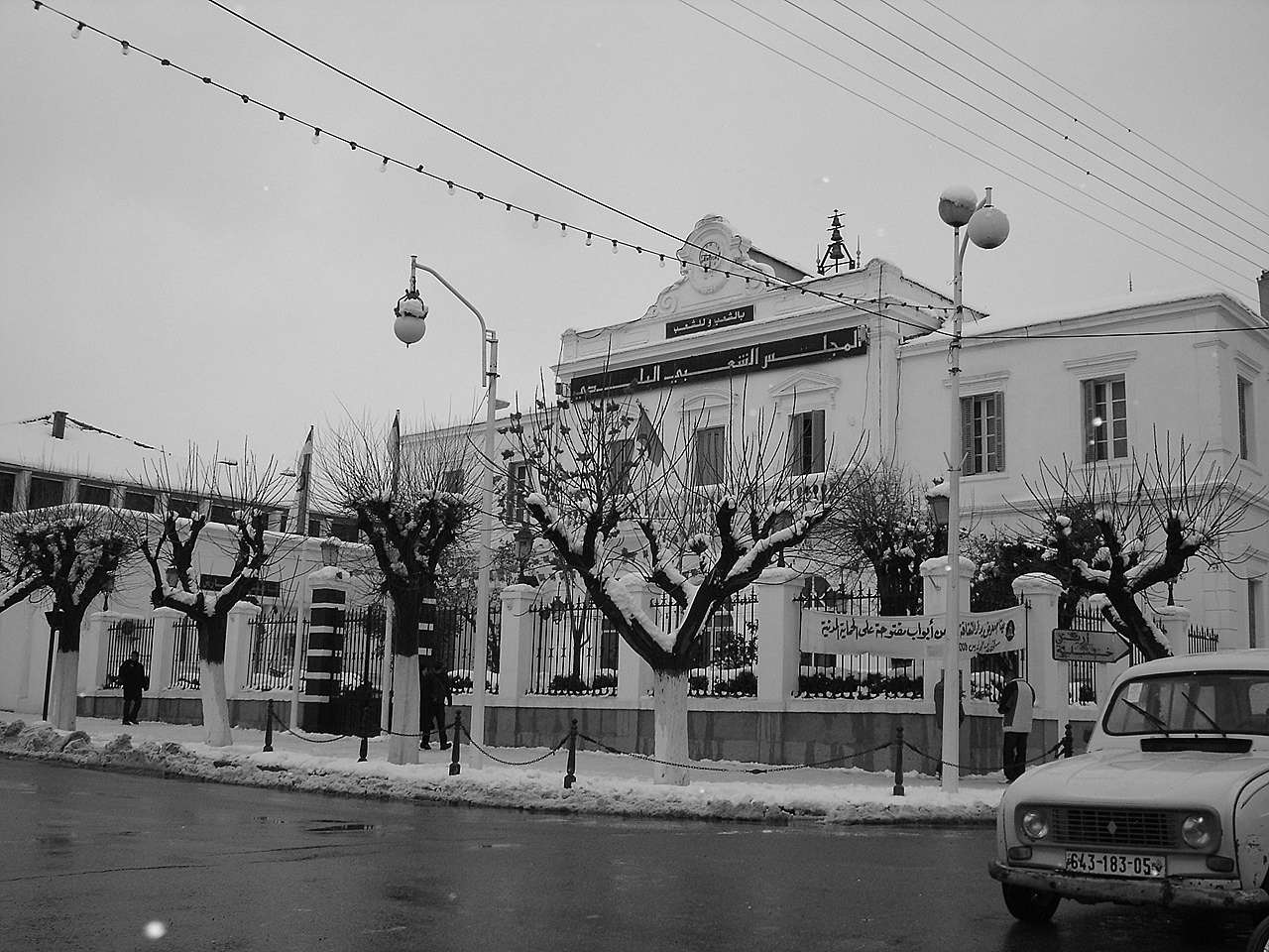 La municipalité et le centre ville de Batna sous la neige (Algérie).